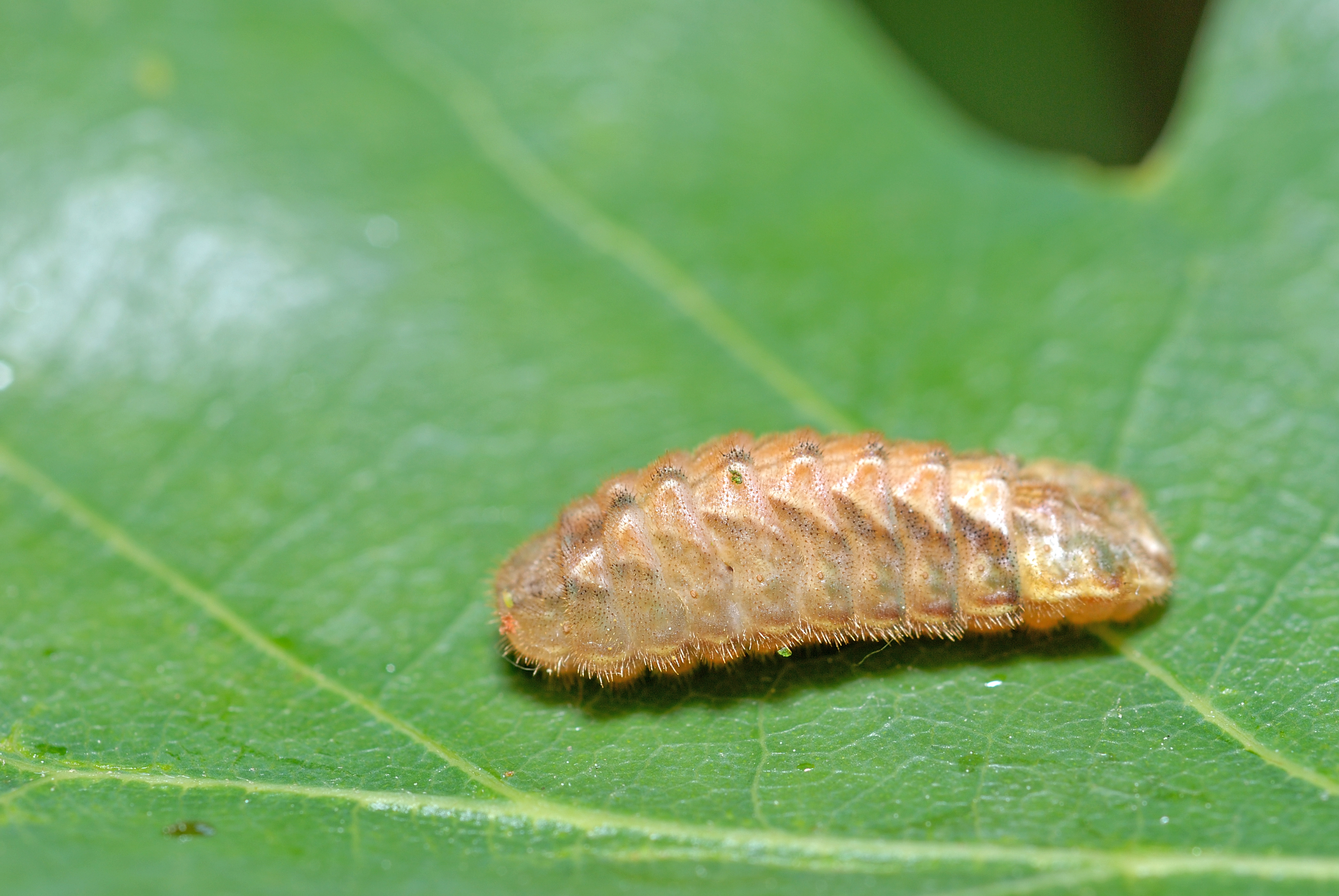 Neozephyrus quercus larva